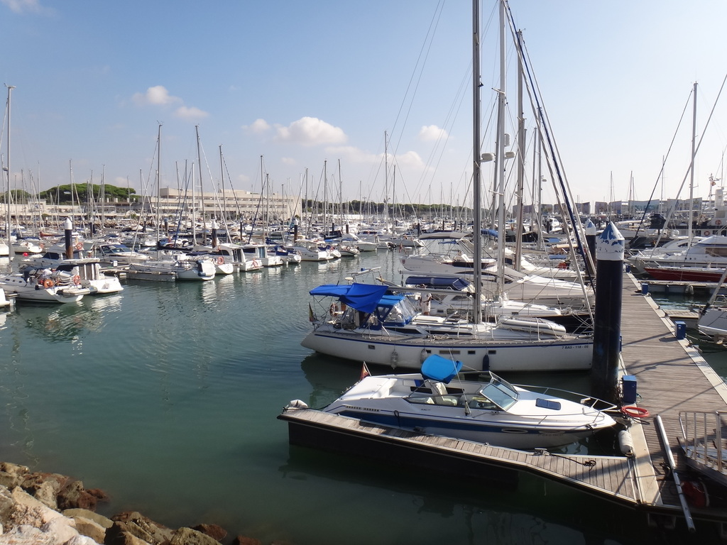 Puerto Sherry, El Puerto de Santa María (Andalucía, Spain).